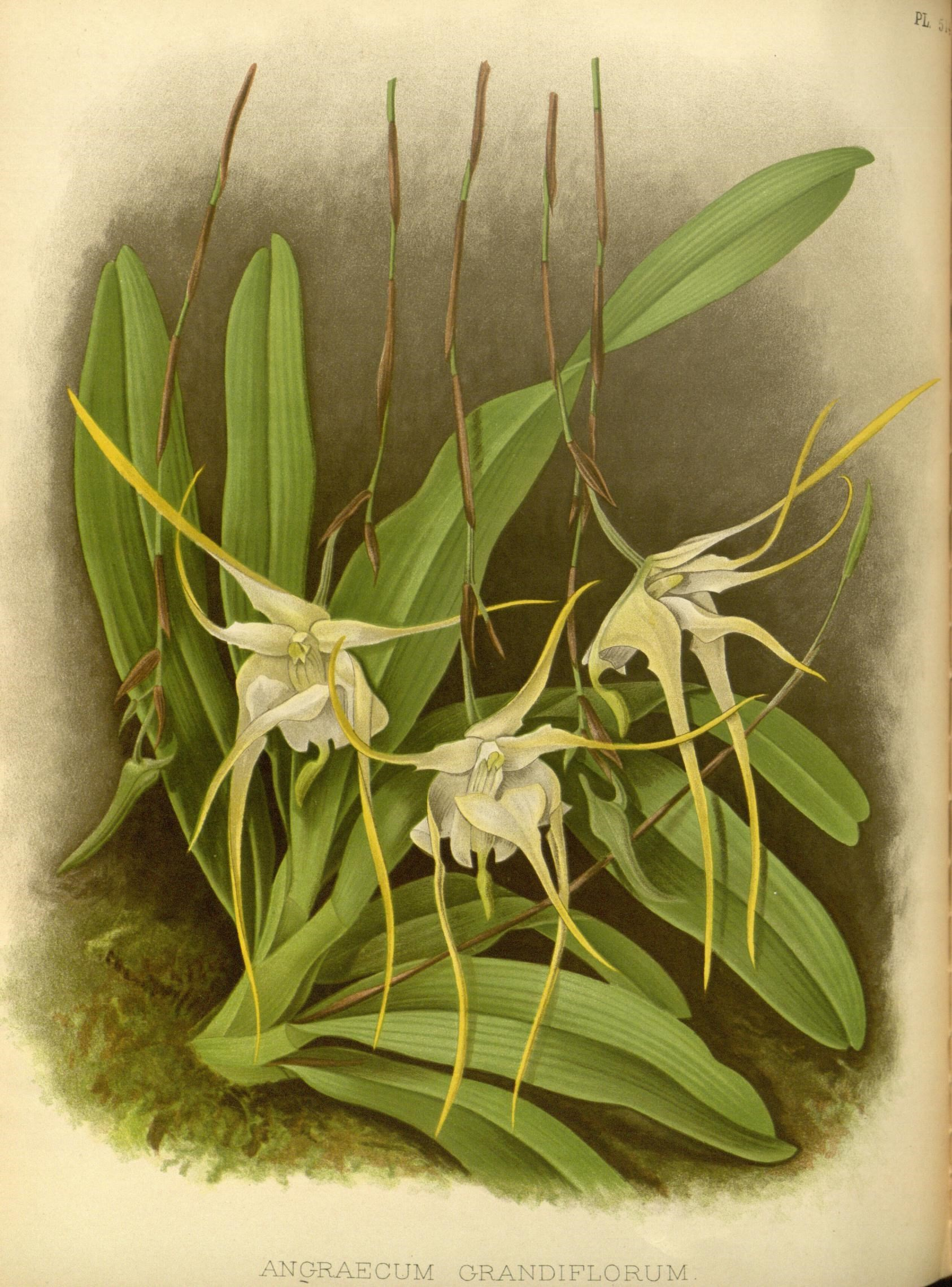 PL i t 1 ! rT- 1 i iT .-V - '1 I ""\ . 1-. ^ ^ t ^ r I I L 5^ ANC-RAECUM QRANDIFLORUM . image/jpeg 2277 1685 false false false Aeranthes grandiflora est une espèce d'orchidée épiphyte originaire de Madagascar. Aeranthes grandiflora [SEP]